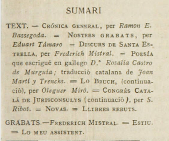 Ilustració Catalana, primera època, número 035 Data: 20 de Juny de 1881 pàg. 273